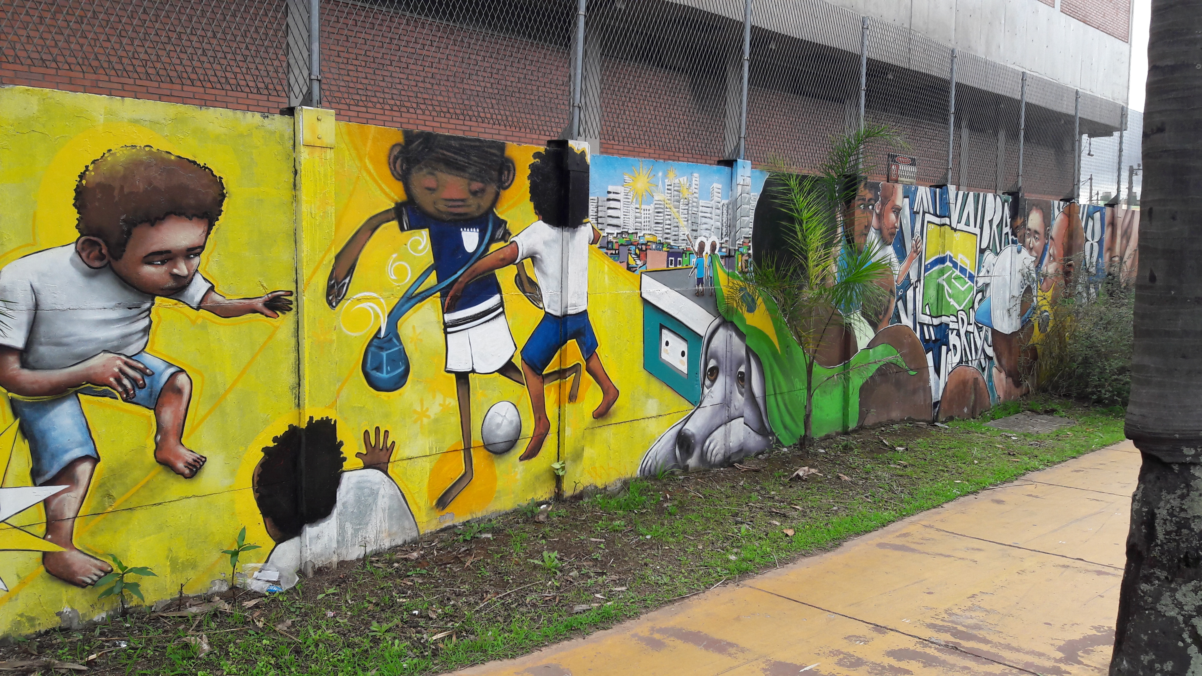 Vista do muro grafitado pelo projeto 4KM, em São Paulo (city), Brasil.